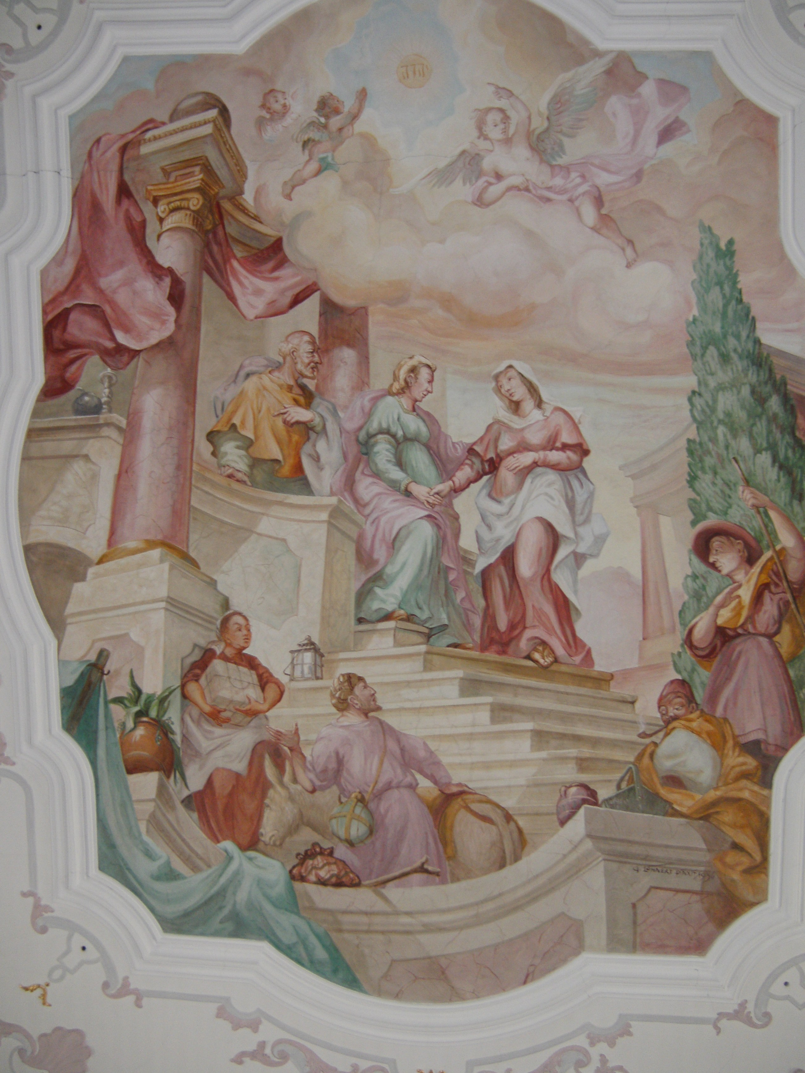 Deckengemälde in der Kirche von Irlahüll, Gemeindeteil von Kipfenberg im Landkreis Eichstätt, Bayern